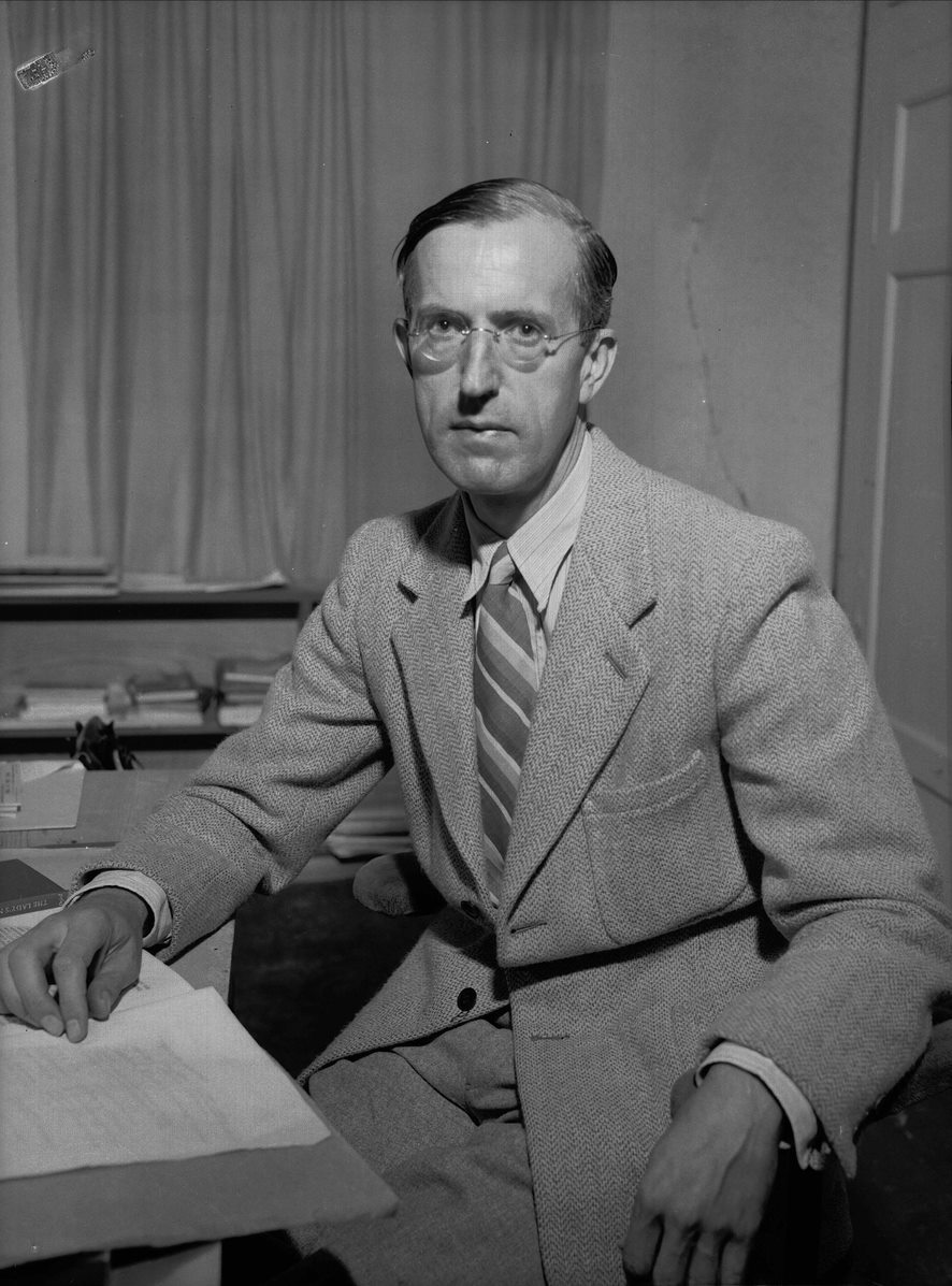 Anton Rønneberg, norsk dramaturg, teatersjef, kritiker og forfatter